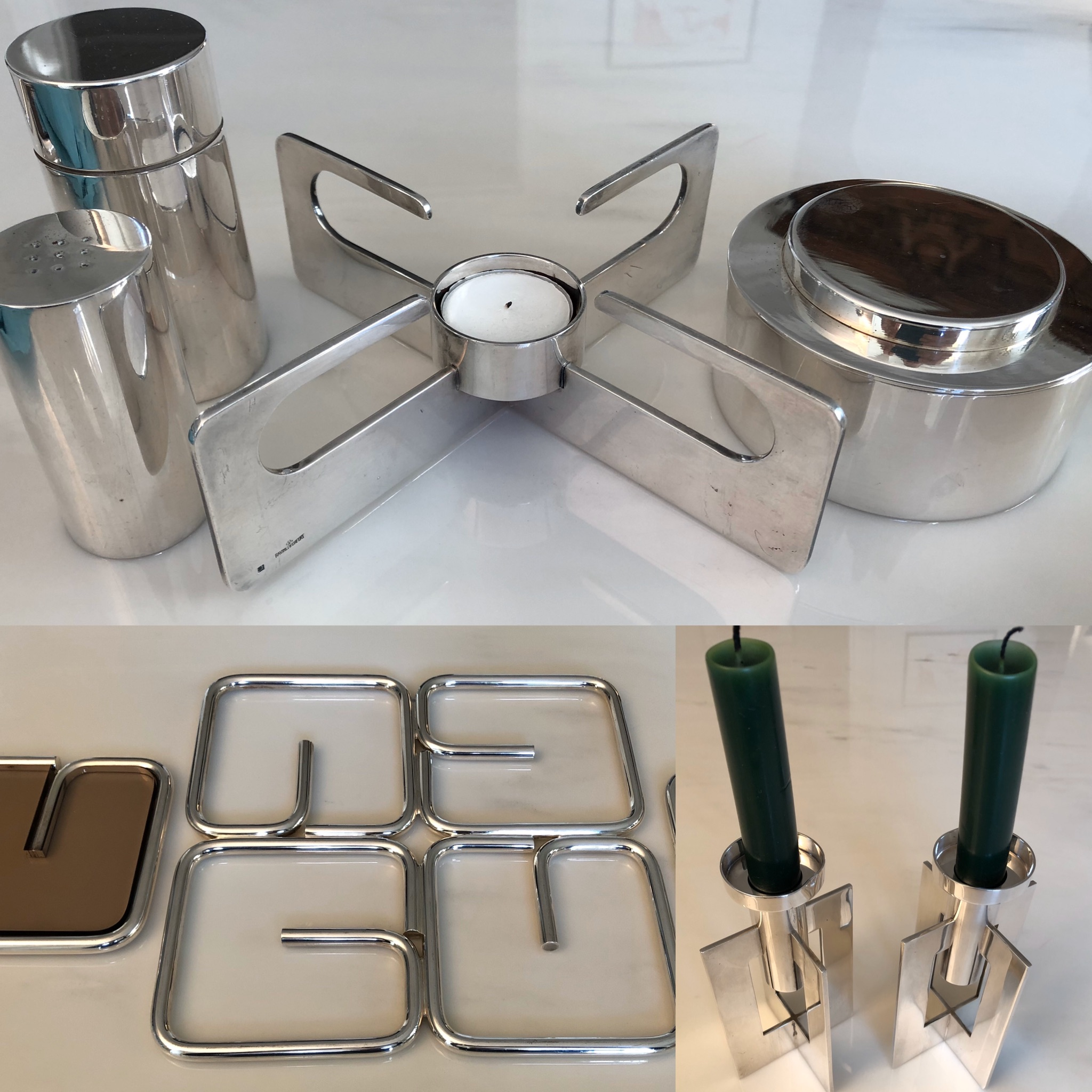 Modèles créés par Bruno d'Enfert: salière, poivrier, chauffe-plat, sucrier, dessous de plats, dessous de carafe, bougeoirs